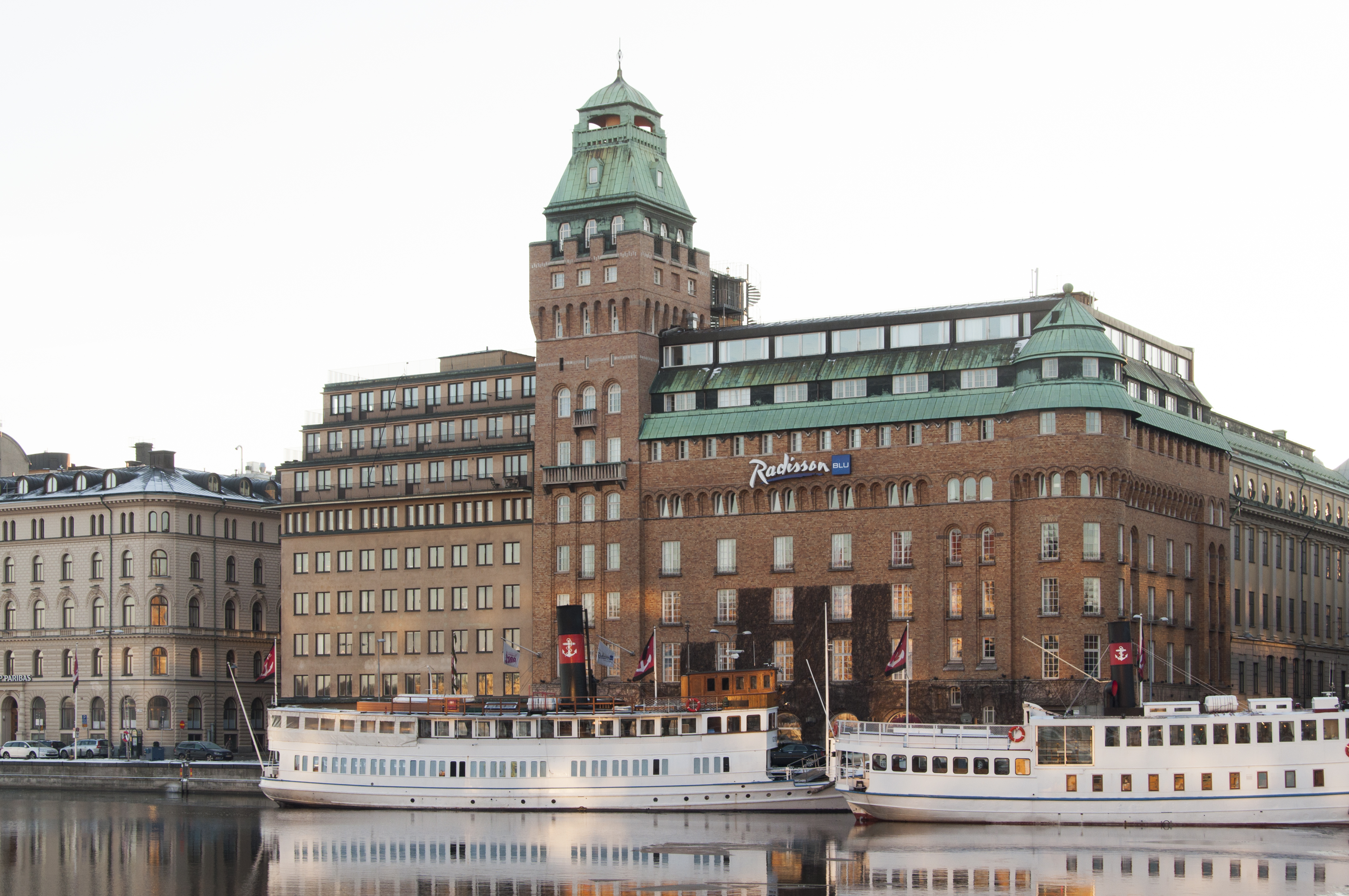 Strand Hotel, Stockholm. Kv Måns Bock 2, Stallgatan 8, Nybrokajen 9, Byggnadsår 1909-12, arkitekt Ludvig Peterson, byggherre Svenska frimurarorden, byggmästare O Herrström Måns Bock 3, Nybrokajen 7, Teatergatan 2-4, Byggnadsår 1930-32, arkitekt Berndt Lundahl, byggherre Fastighets AB Nybro, byggmästare N Malmberg